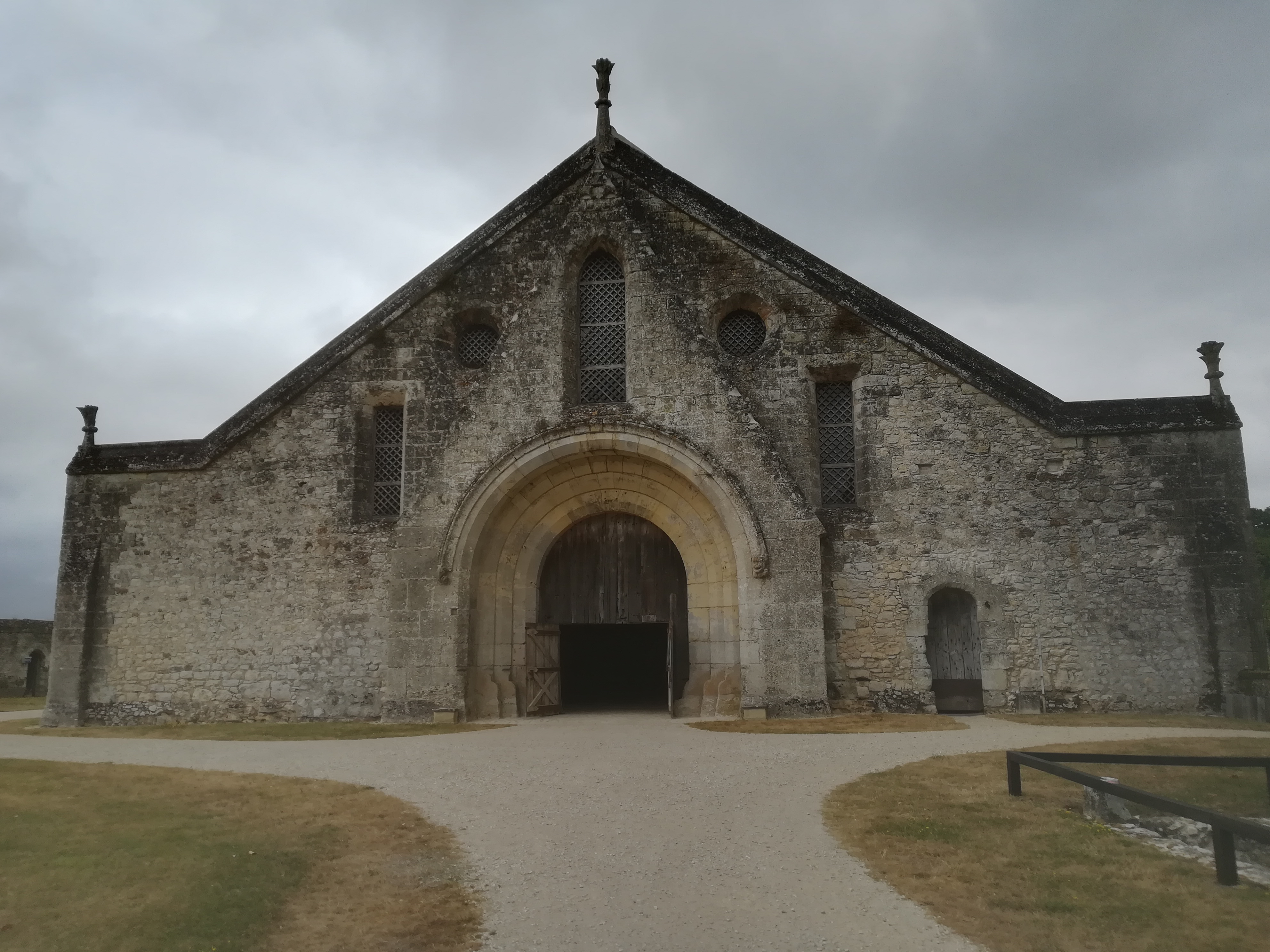 Façade de la Grange de Meslay, spécimen de l'architecture civile du XIIIe siècle, longue de 60m, large de 25m, haute de 17m.